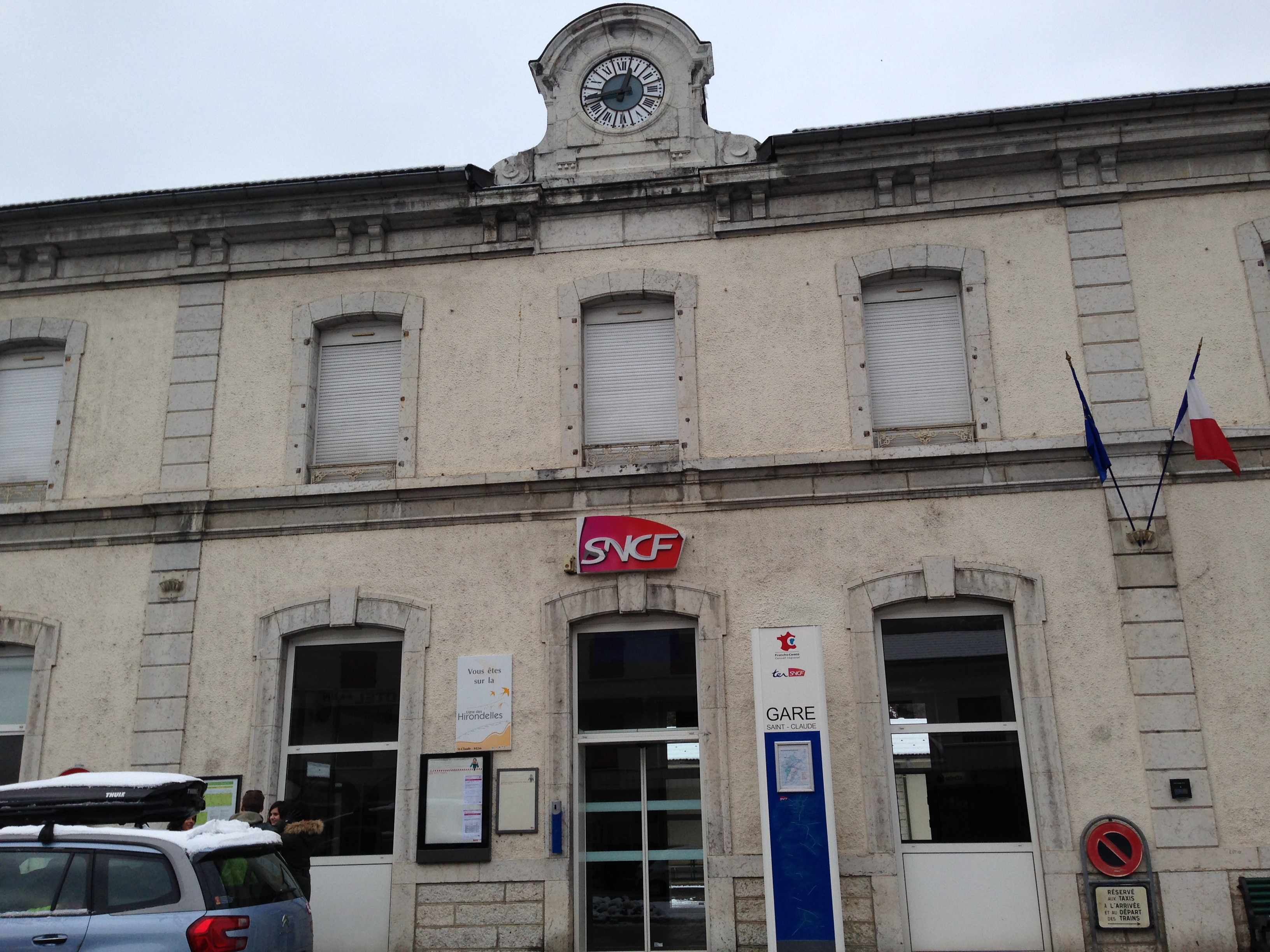 Gare de Saint-Claude en Décembre 2014